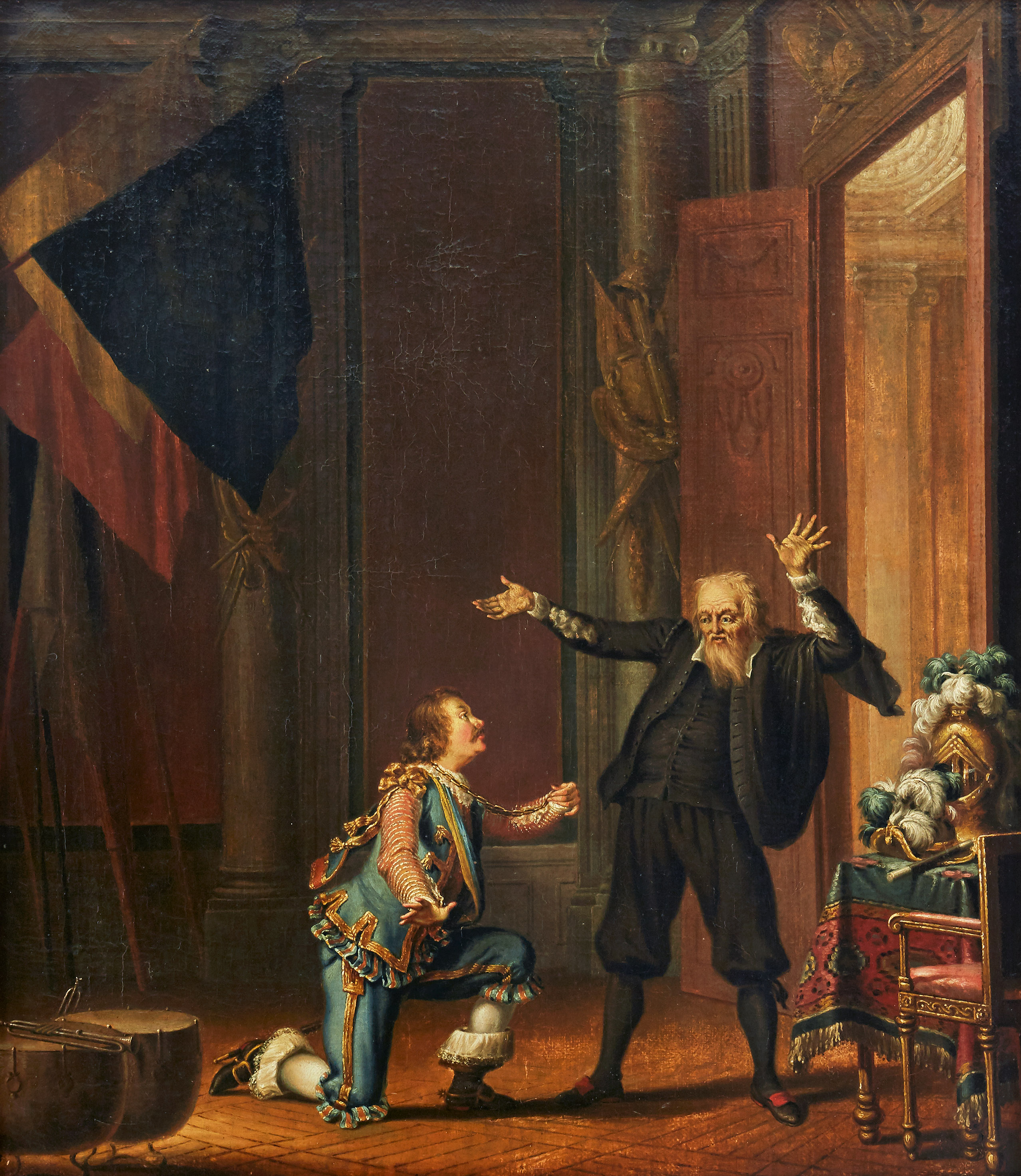 Målning som visar scen ur operan Helmfelt av Gustav III. I scenen som Hilleström skildrat, akt 5 scen 4, knäfaller Helmfelt framför sin åldrade far. Fadern Grundel som tidigare varit borgmästare i Stockholm syns stående i en vacker interiör med armarna lyfta i en kraftfull gest. Olja på duk, 70 x 62 cm. Målning av Pehr Hilleström. Operan om Helmfelt skriven av kung Gustav III har sitt ursprung i Fältmarskalk Helmfelts liv och leverne. Helmfelt flydde i sin ungdom sitt hem och återupptäcktes efter 17 år av sin familj då han nått de högre graderna inom militären. Dramat uppfördes ursprungligen 1783 av hovet på Ulriksdal och framfördes senare vid Bollhuset i Stockholm 1788.